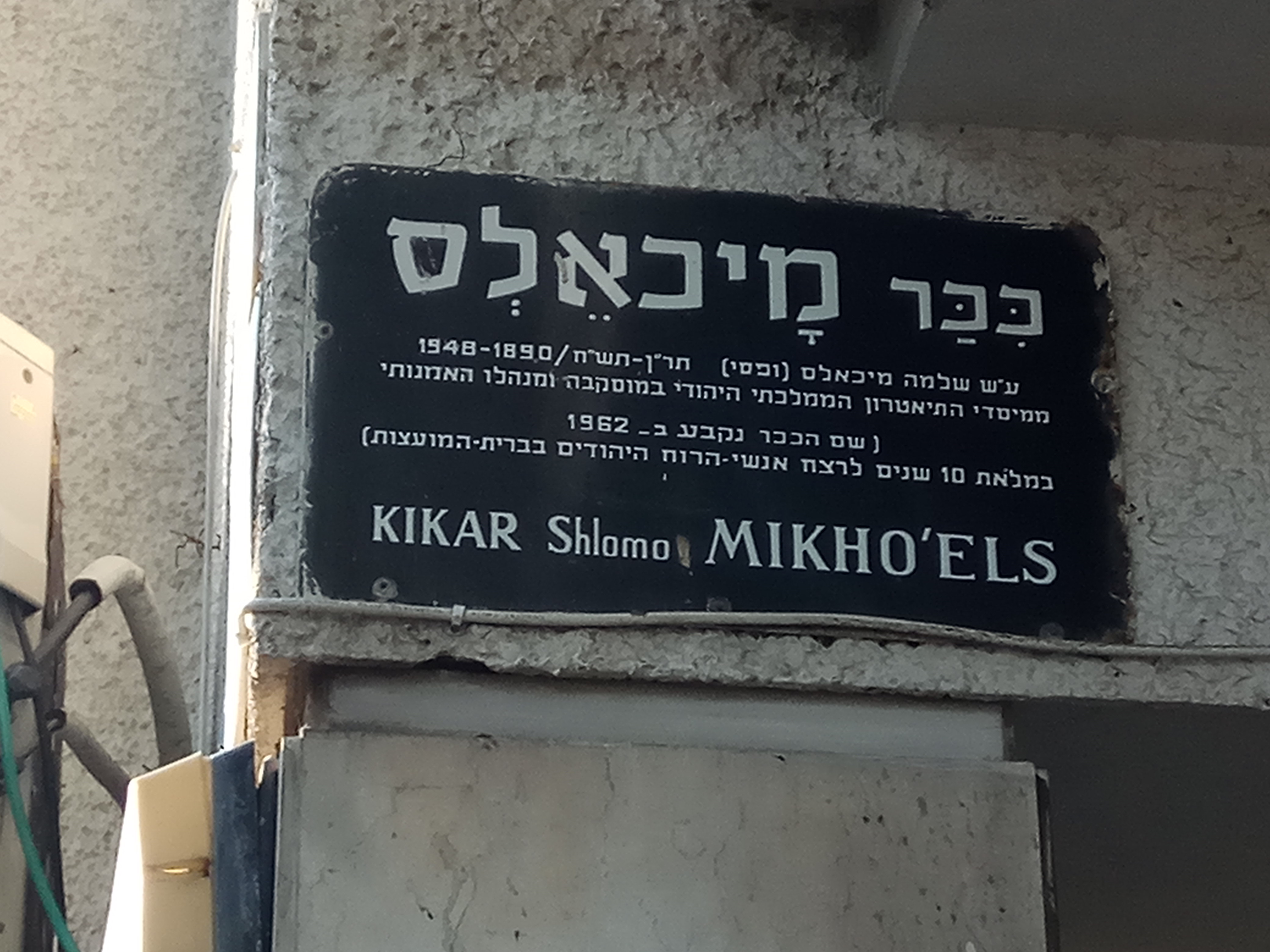 שלט בכיכר שלמה מיכאלס בת אביב